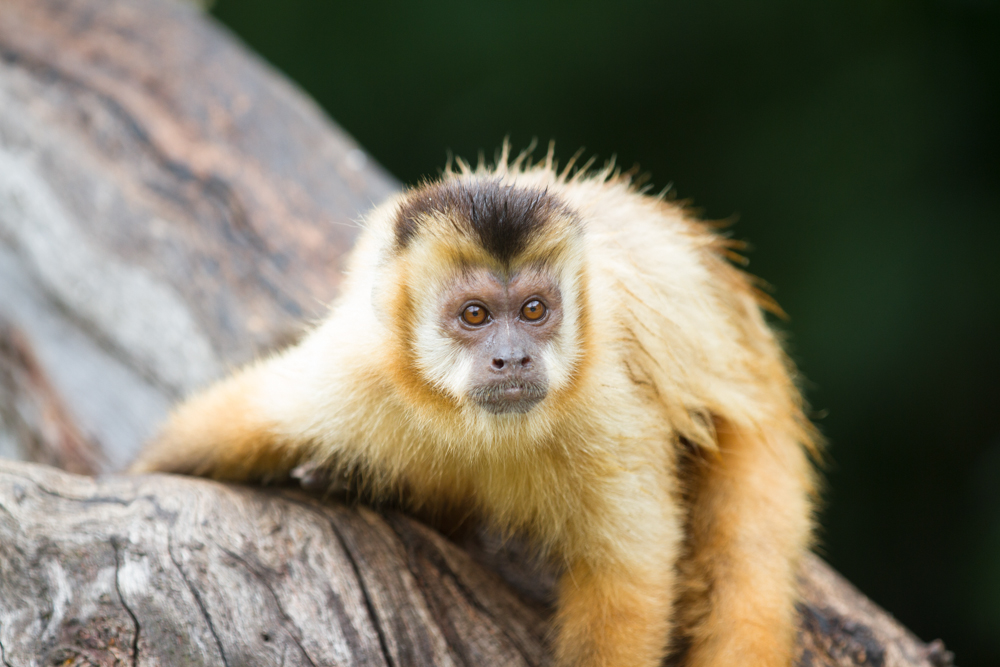 Macaco-prego, fotografado em Bonito, MS, no balneário municipal.